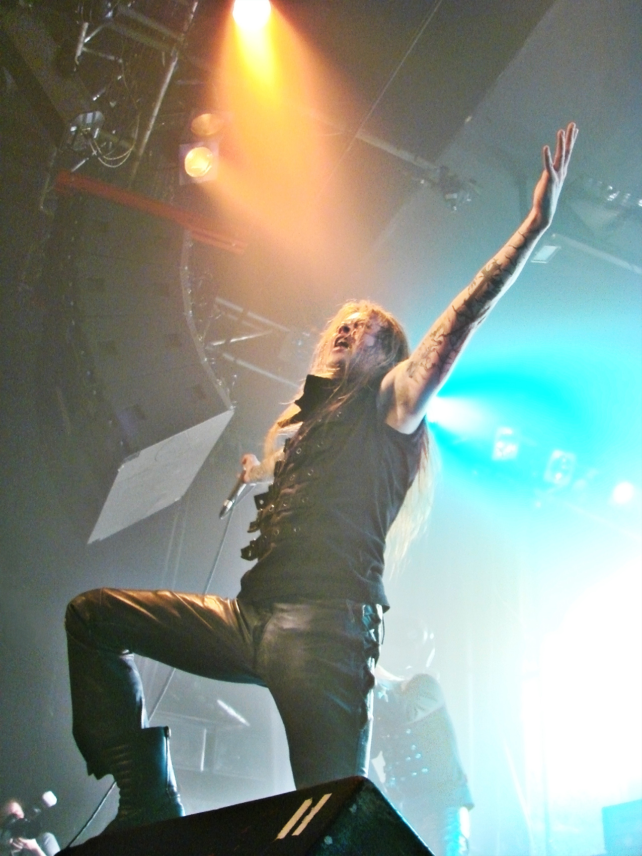 Devian en concert à la Locomotive, à Paris, le 01/05/2008: Legion au chant.